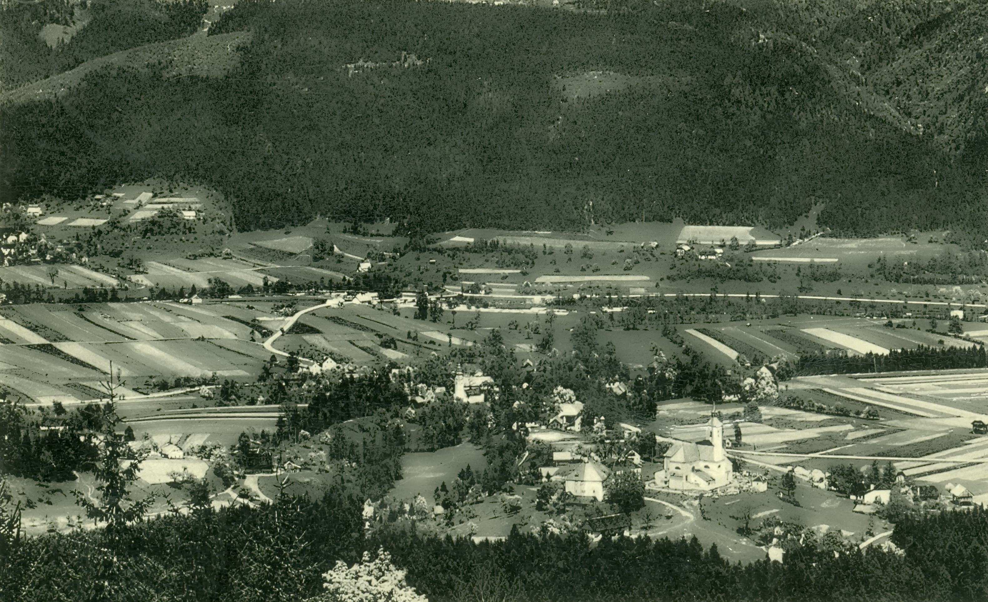 Radmirje v Savijnski dolini 1936. Tomica 0302 R w W